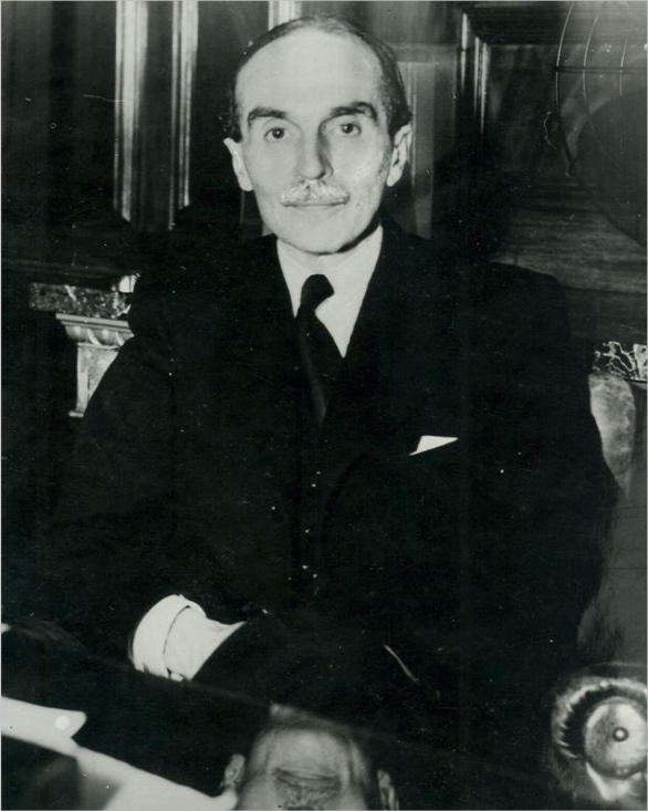 Fotografia de el ingeniero argentino "Francisco de Arteaga" entre 1914 y 1918.